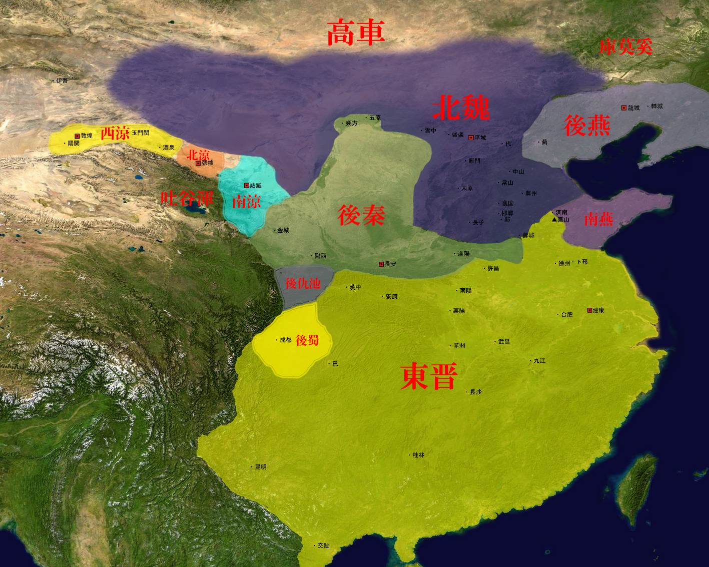 406年頃の五胡十六国時代の地図